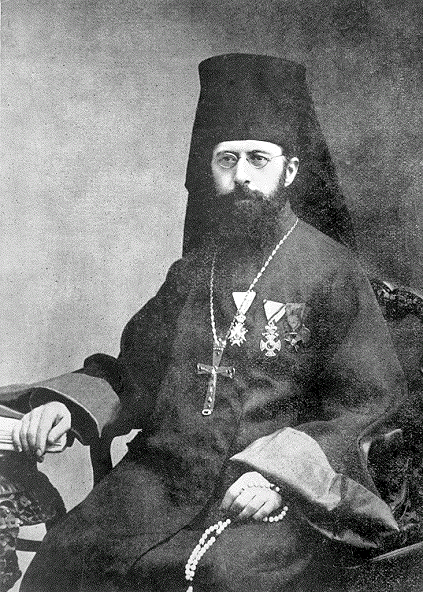 Архимандрит Севастиан (Дабович) 1863 - 1940